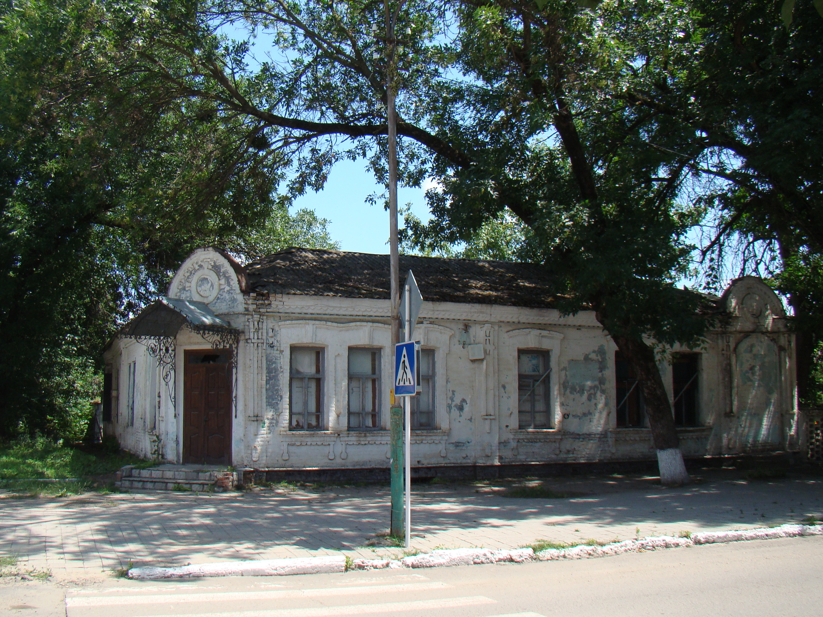 Город Усть-Лабинск. Старое здание ул.Ленина/ул. Д.Бедного.